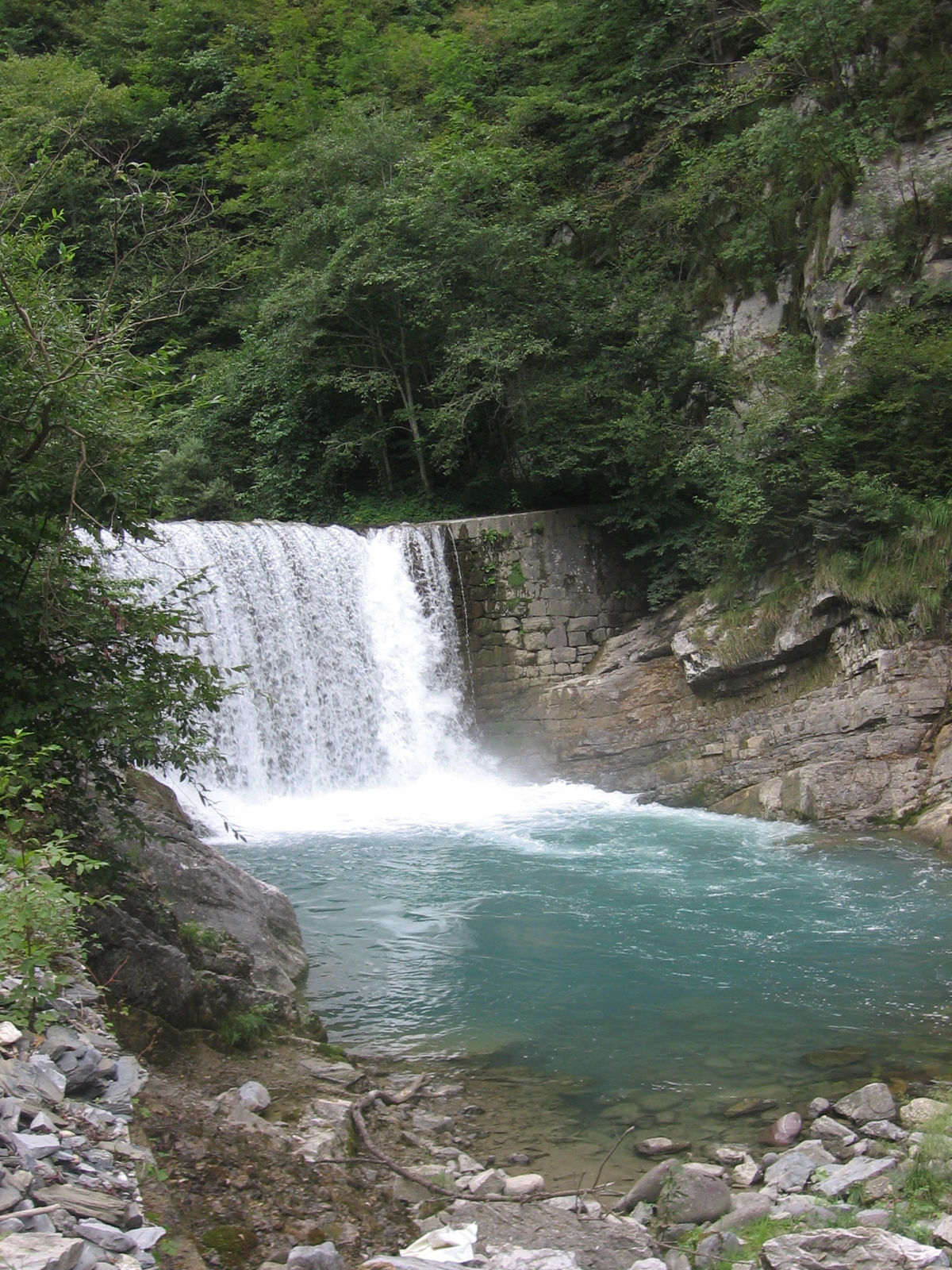 Torrente Dezzo, Valle di Scalve, Bergamo, Italy